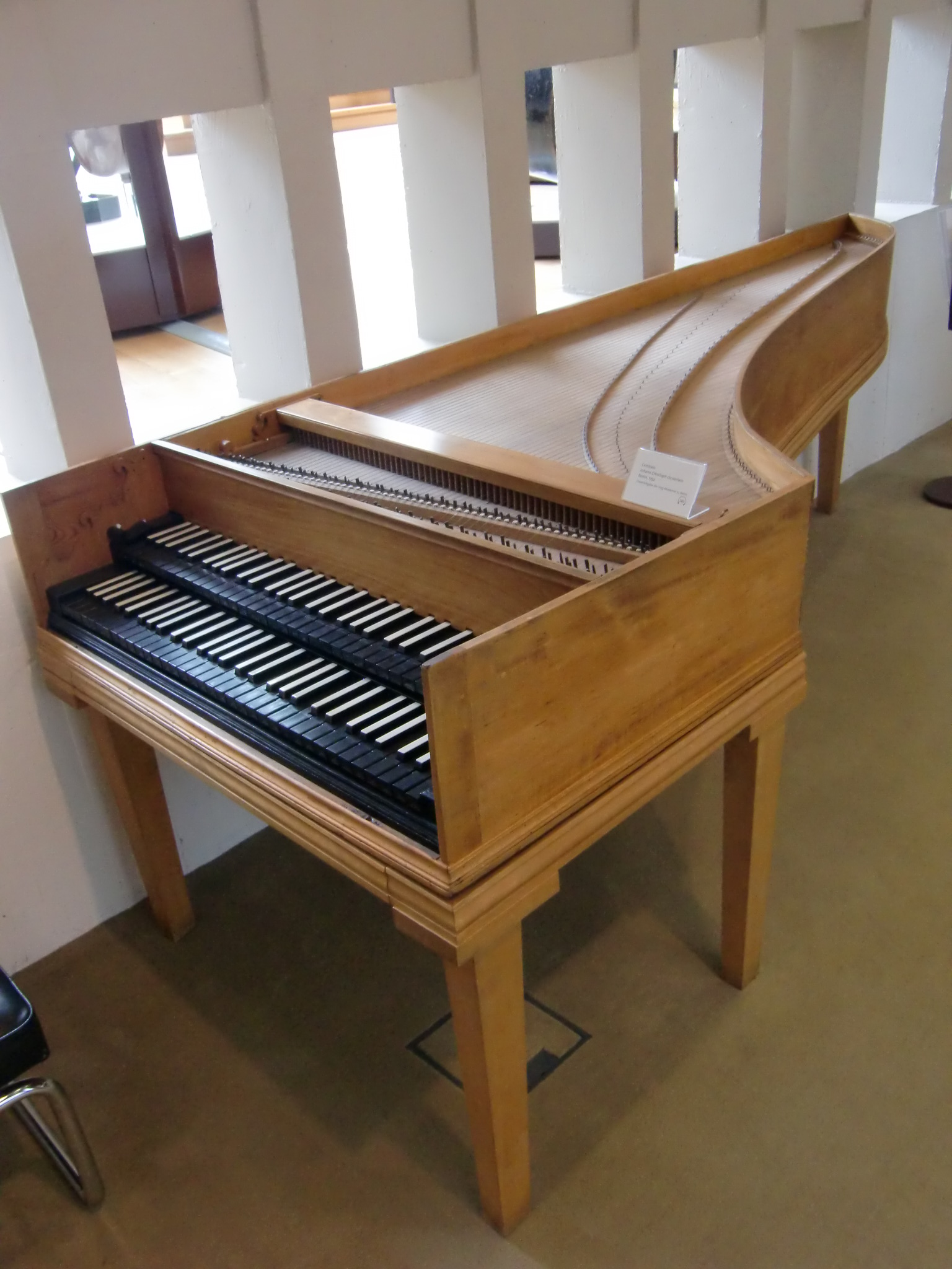 Clavecin de Johann Christoph Oesterlein (Berlin, 1792) - Berlin, Musikinstrumentenmuseum